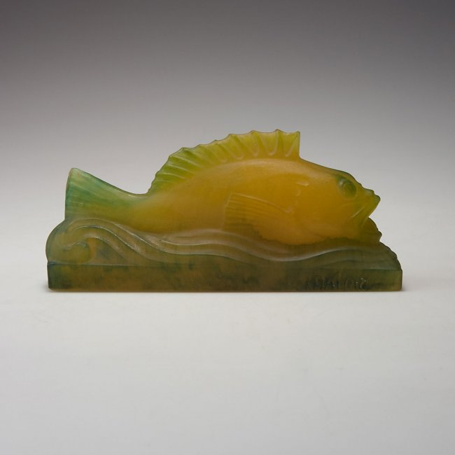 Amalric WALTER, Poisson art déco, ca.1930, 9 x 4,7 x 19cm